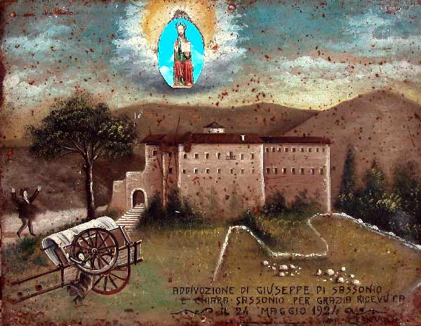 Ex voto custodito nel convento di San Matteo